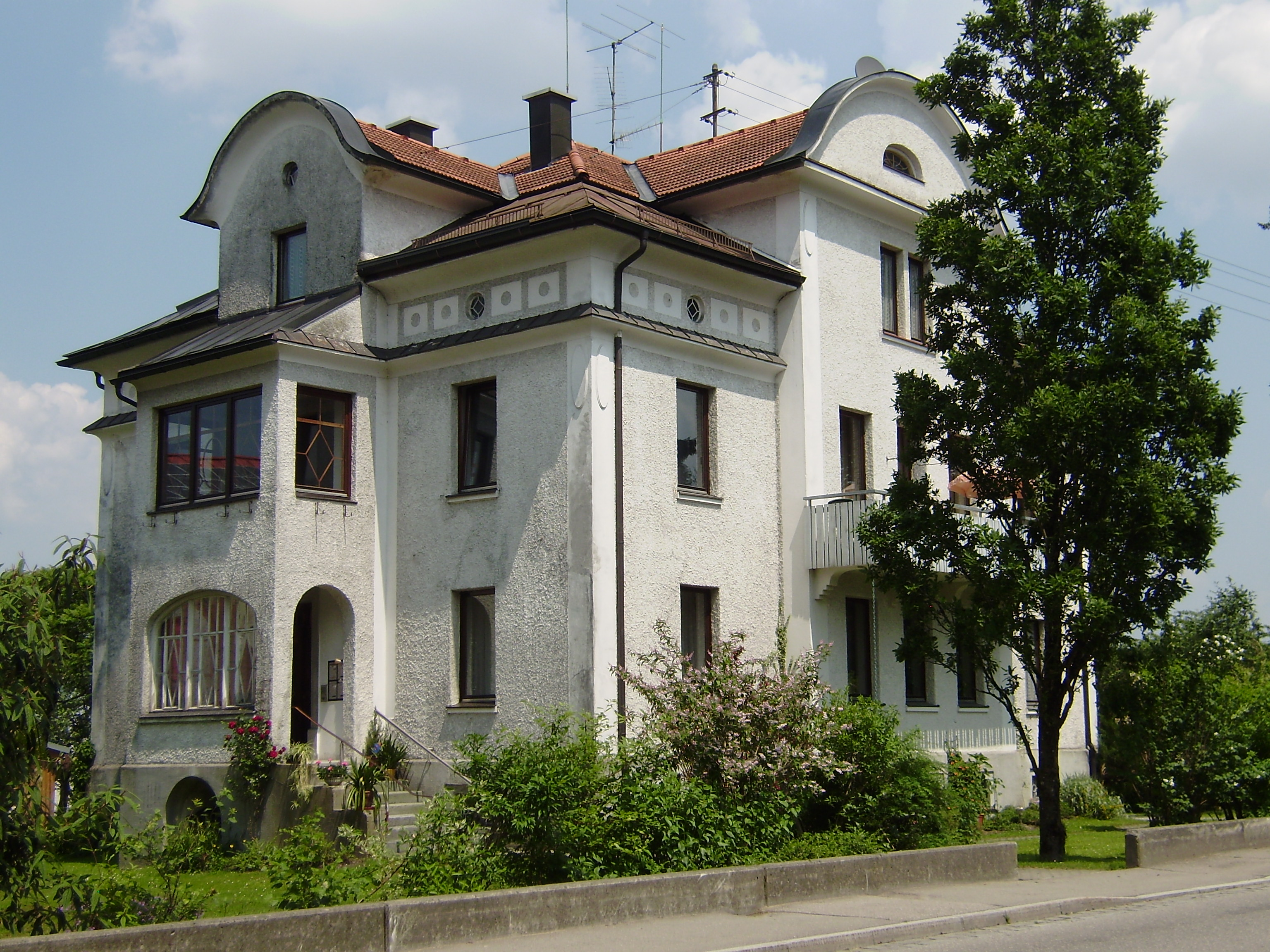 Notariatsvilla in der Alois-von-Brinz-Str 17, Weiler iA. Errichtet von Architekt und Baumeister Georg Bufler